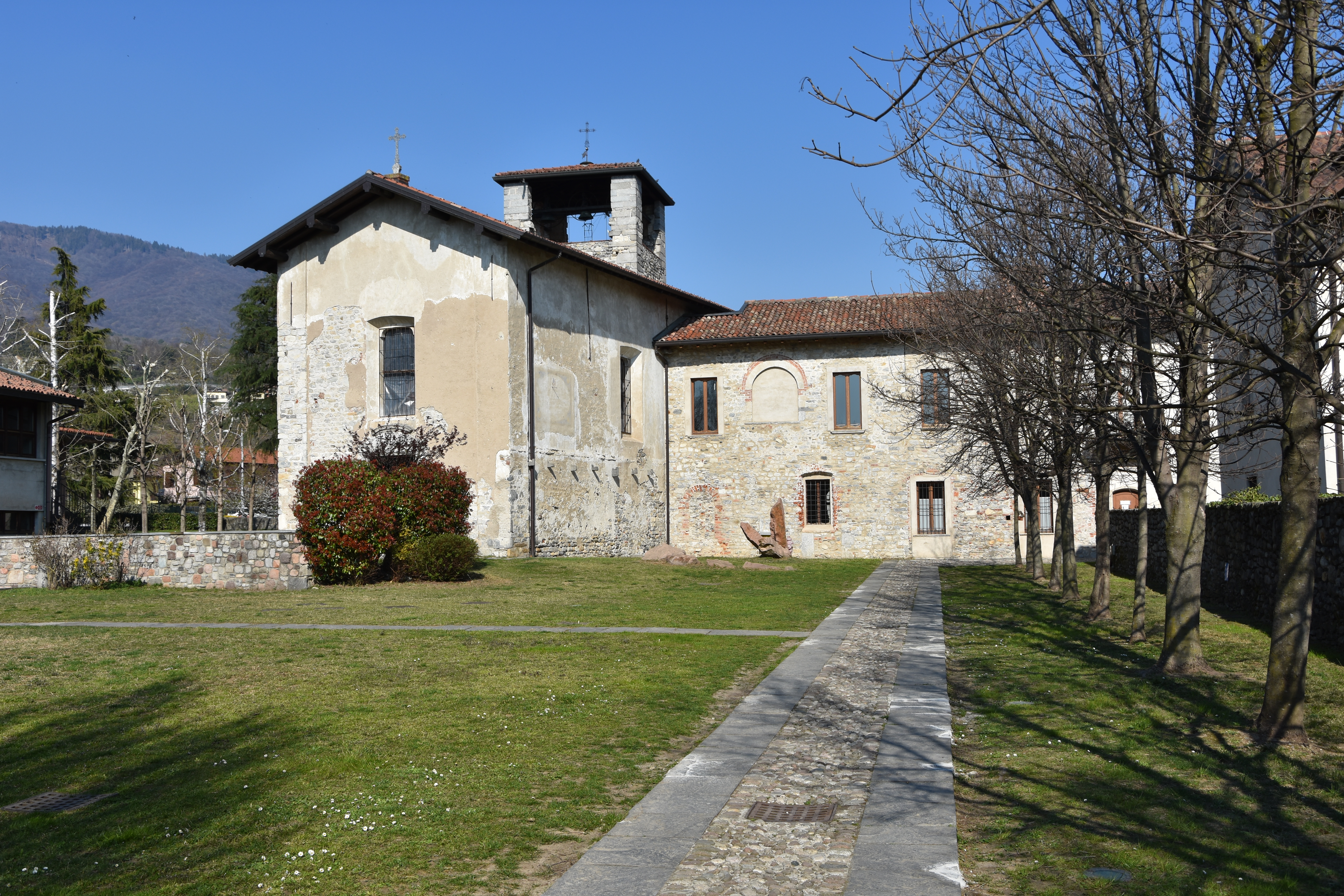 Esterno del chiostro di Voltorre, Gavirate, provincia di Varese.